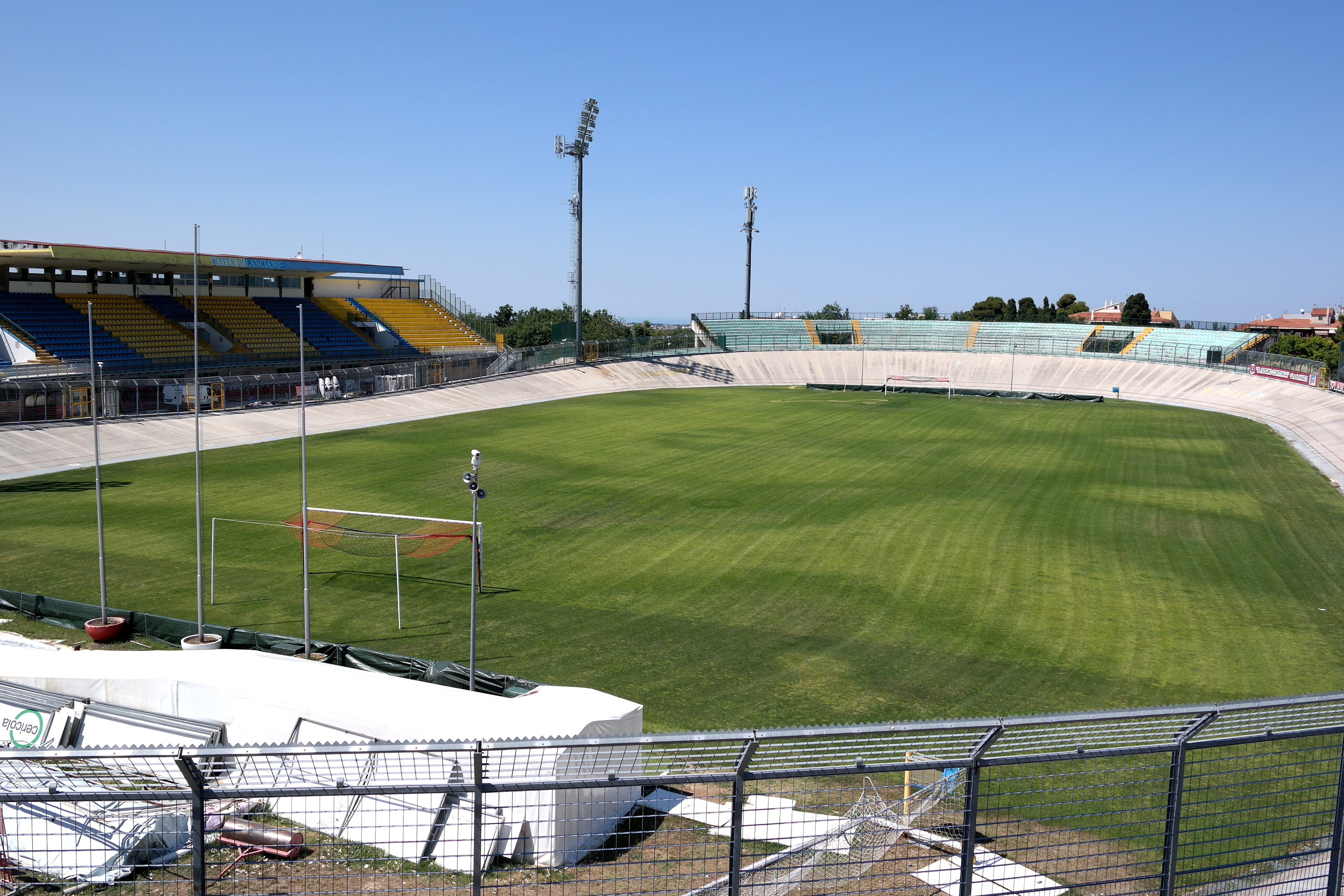 Stadio Guido Biondi di Lanciano